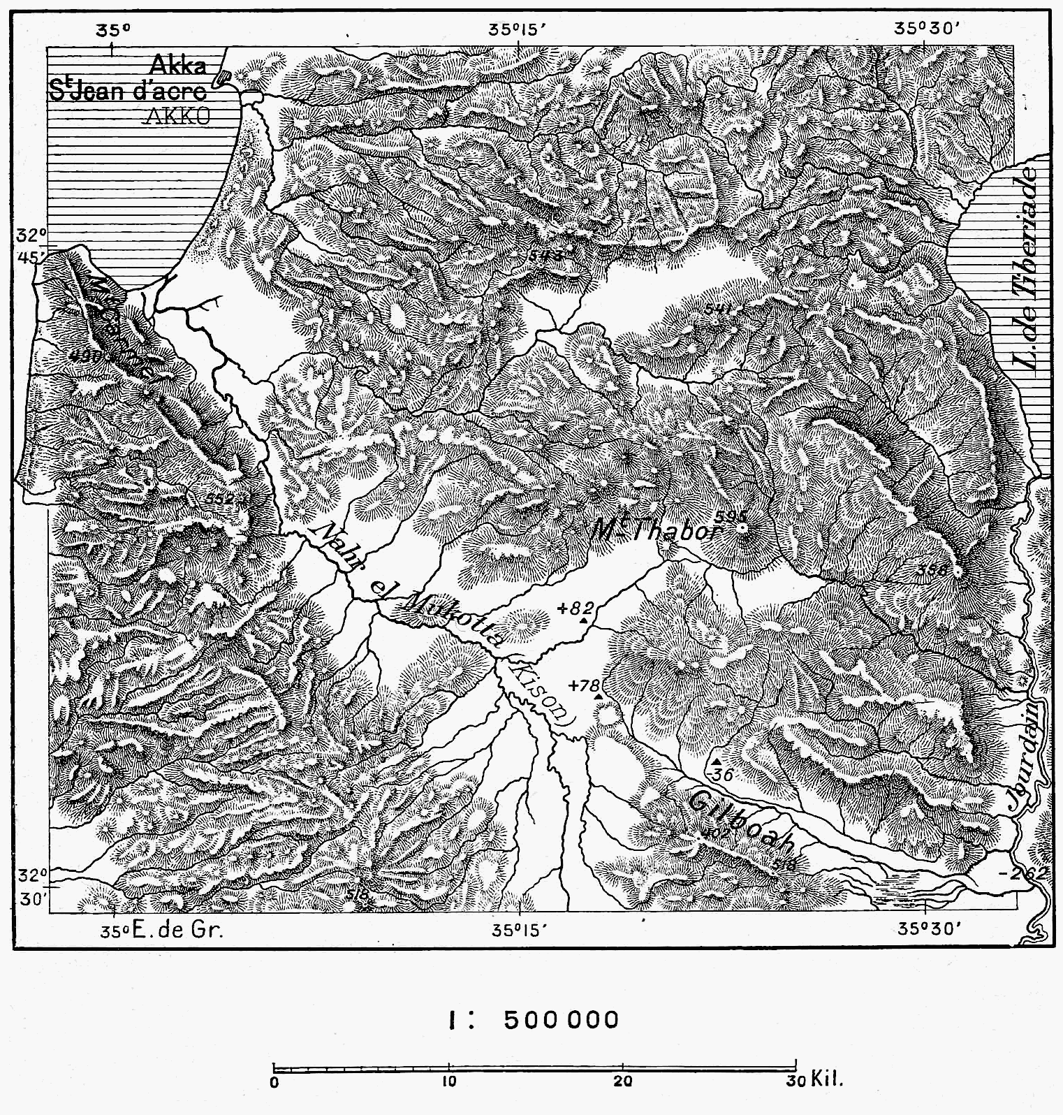 Plaine d’Esdraelon